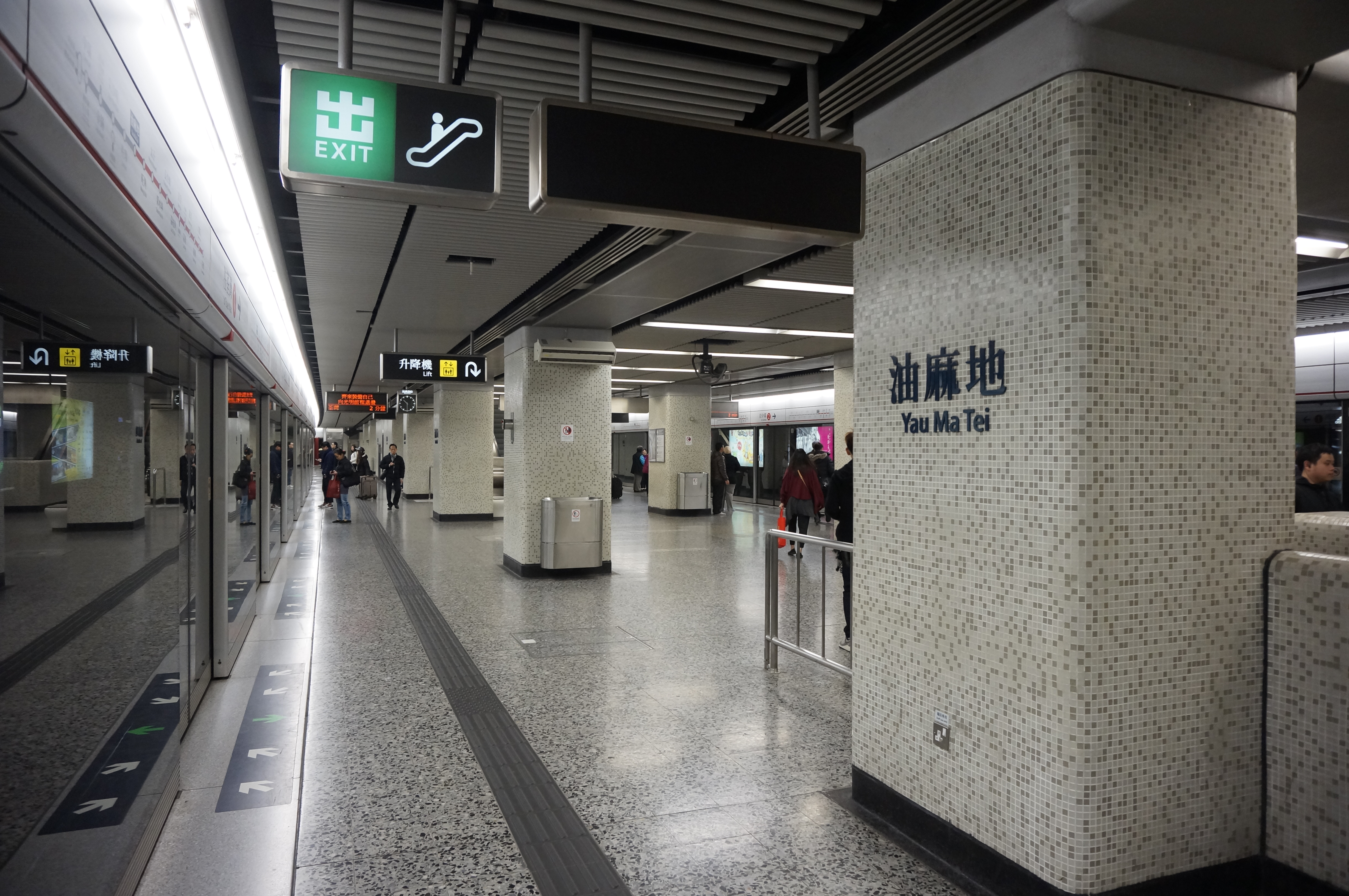 港鐵Template:Wz油麻地站月台